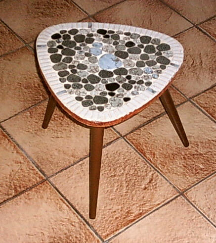 Kleiner Tisch aus den 1950er Jahren mit der typischen Mosaikplatte, Dreiecksform und den ausgestellten Beinen, selbst fotografiert, März 2006